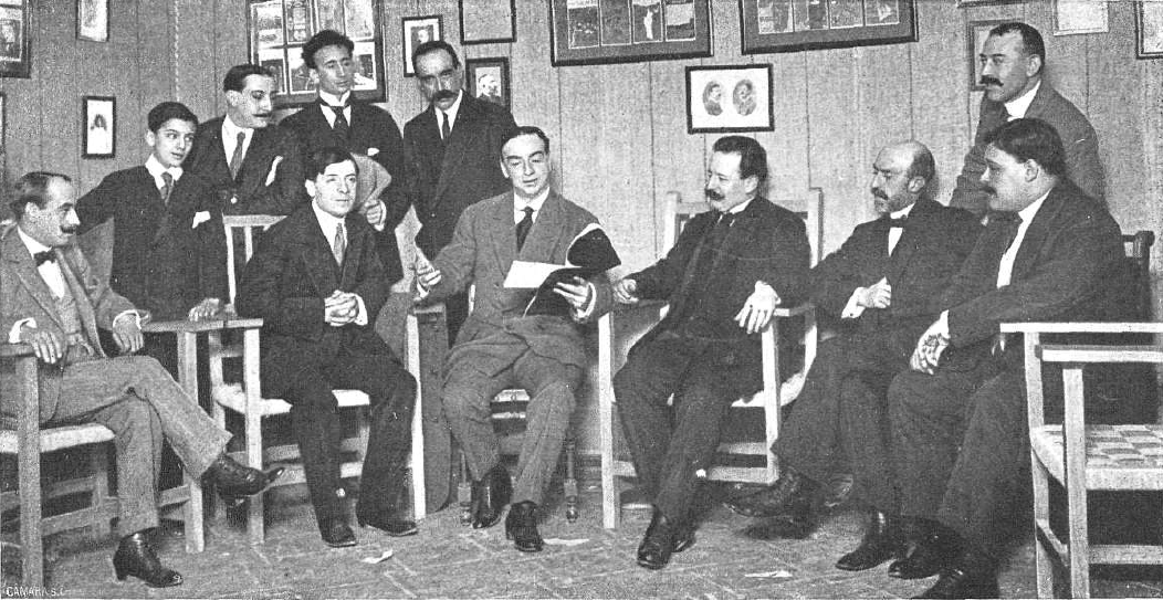 El actor Villagómez (en el centro) lee el drama María de Padilla, de Francisco Villaespesa (sentado a su derecha). Se reconoce entre los presentes a Gregorio Martínez Sierra (sentado, a la izquierda de la imagen), José Francés (de pie, apoyado en la silla de Villaespesa), el argentino David Peña (sentado a la izquierda del actor), Felipe Trigo (a continuación) y Alberto Insúa (sentado a la derecha de la imagen).